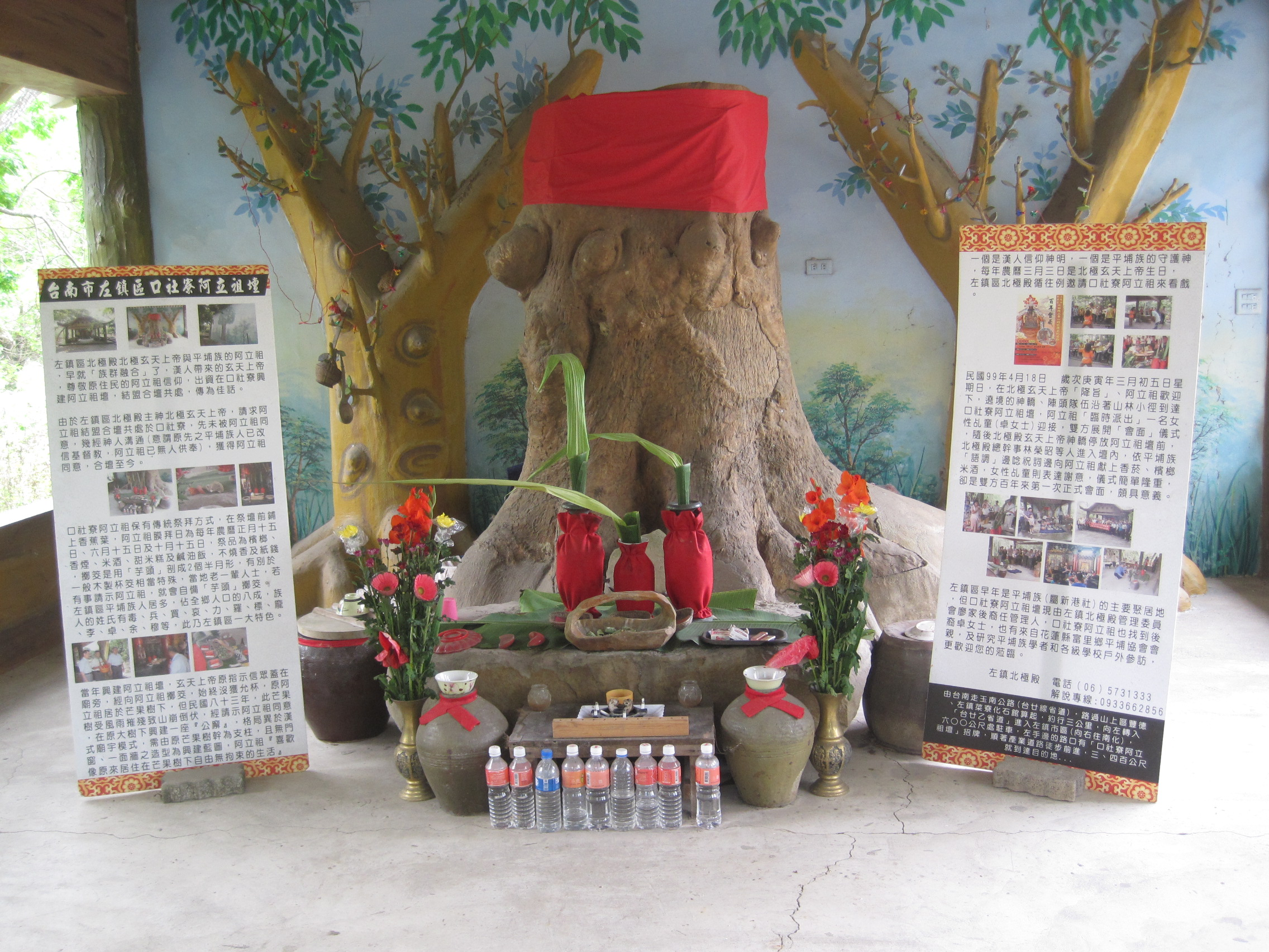 中文（台灣）: 口社寮阿立祖壇內部